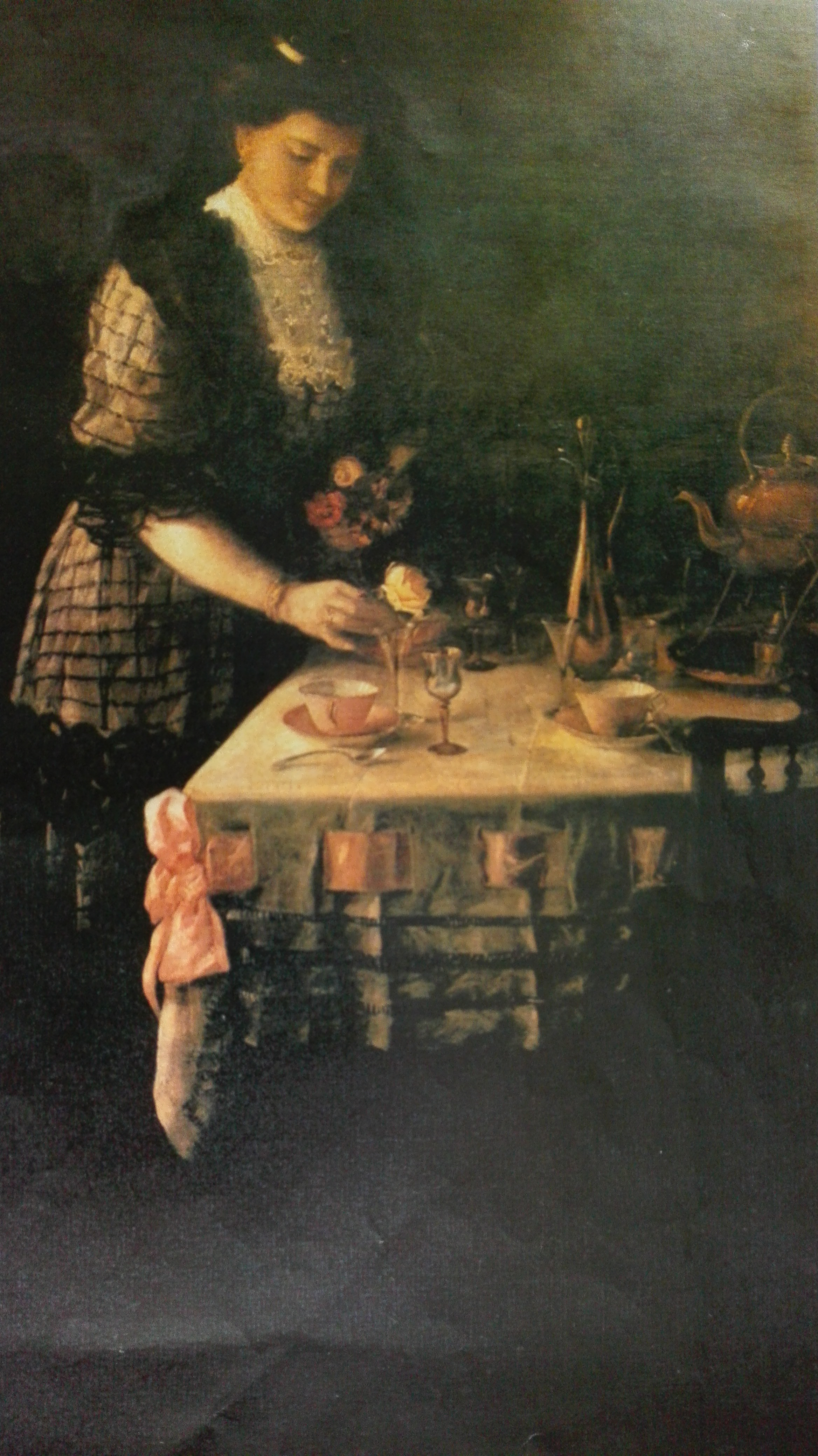 Concha Mori "Los Últimos Toques". Lienzo de 110x190 cm.